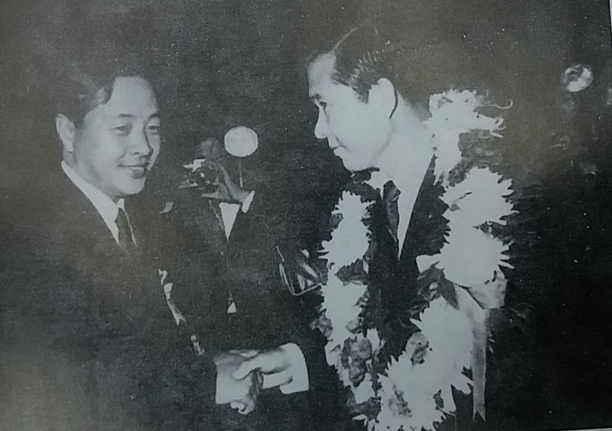 金泳三与金大中